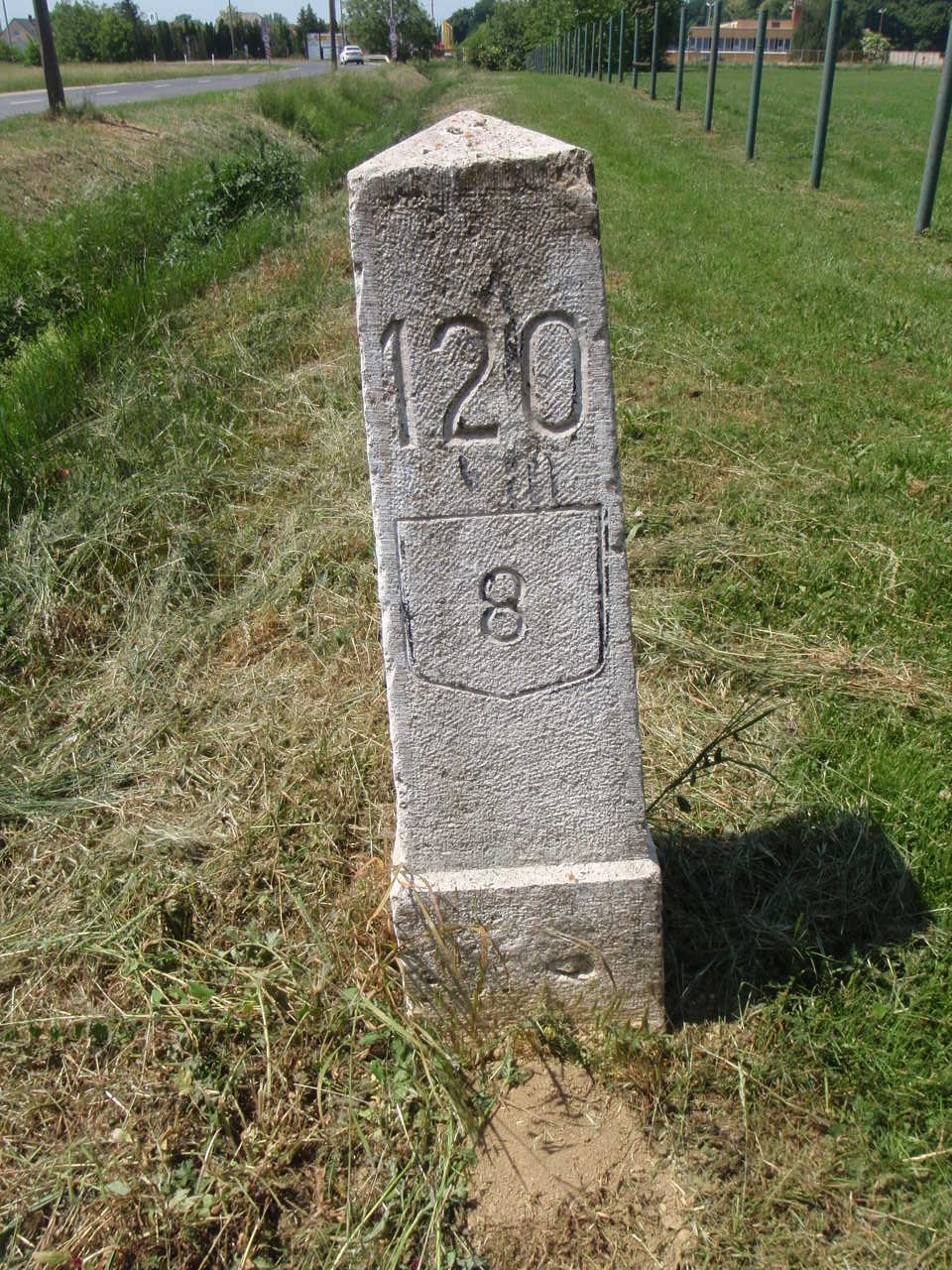 A 8-as főút egykori km köve, ma Sárváron áll az iparterületen a 8446j.összekötő út mellett